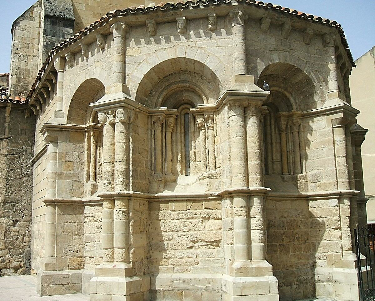 Ábside románico de la Iglesia del Espíritu Santo, Miranda de Ebro, Burgos, España/Spain